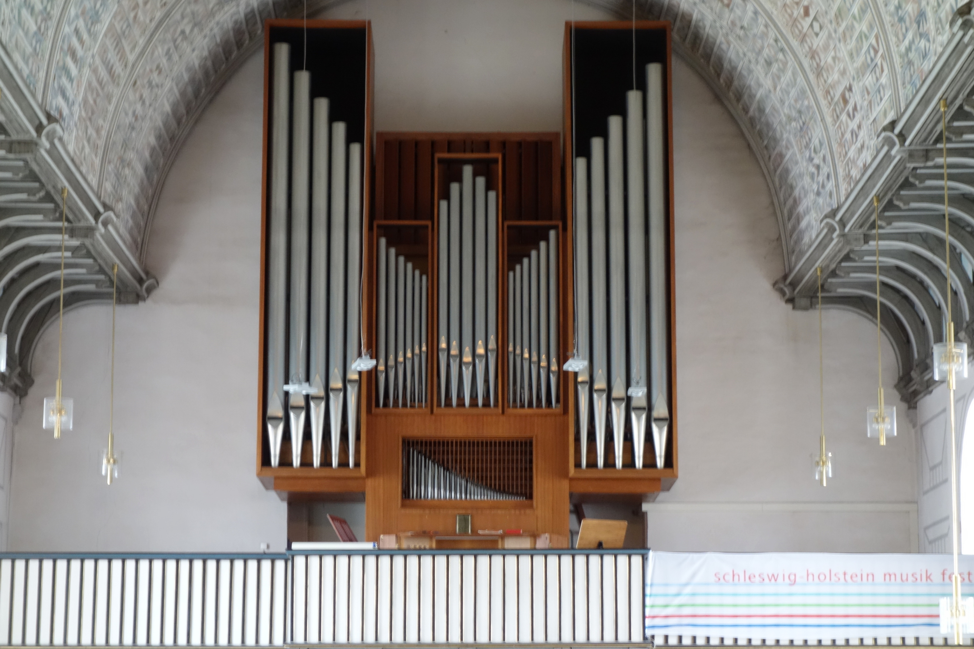 Stadtkirche Plön, Kreis Ostholstein, Schleswig-Holstein, Deutschland